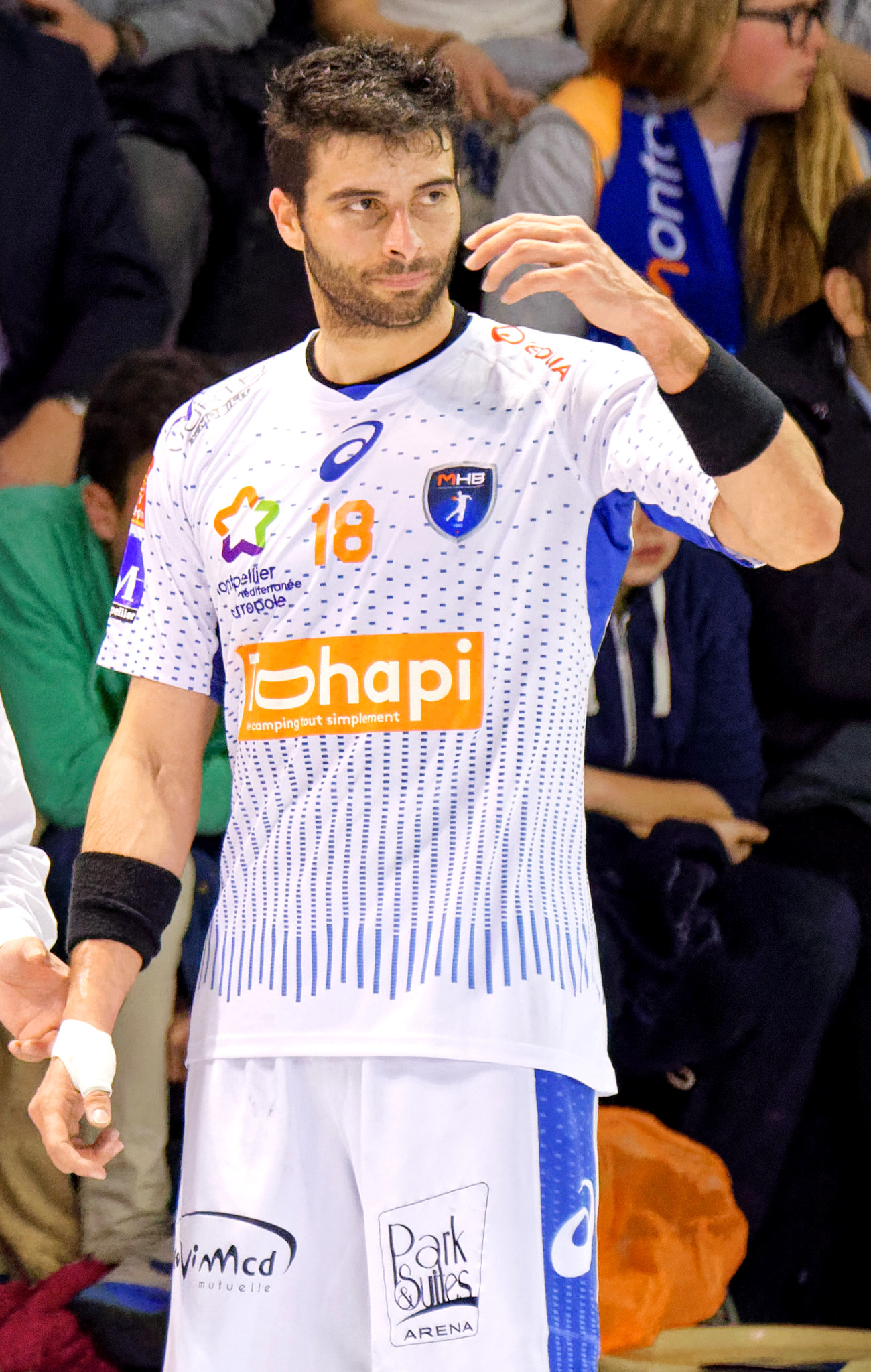 Rencontre du championnat de LNH entre l'US Ivry et Montpellier. A Ivry, le 17 mars 2016.